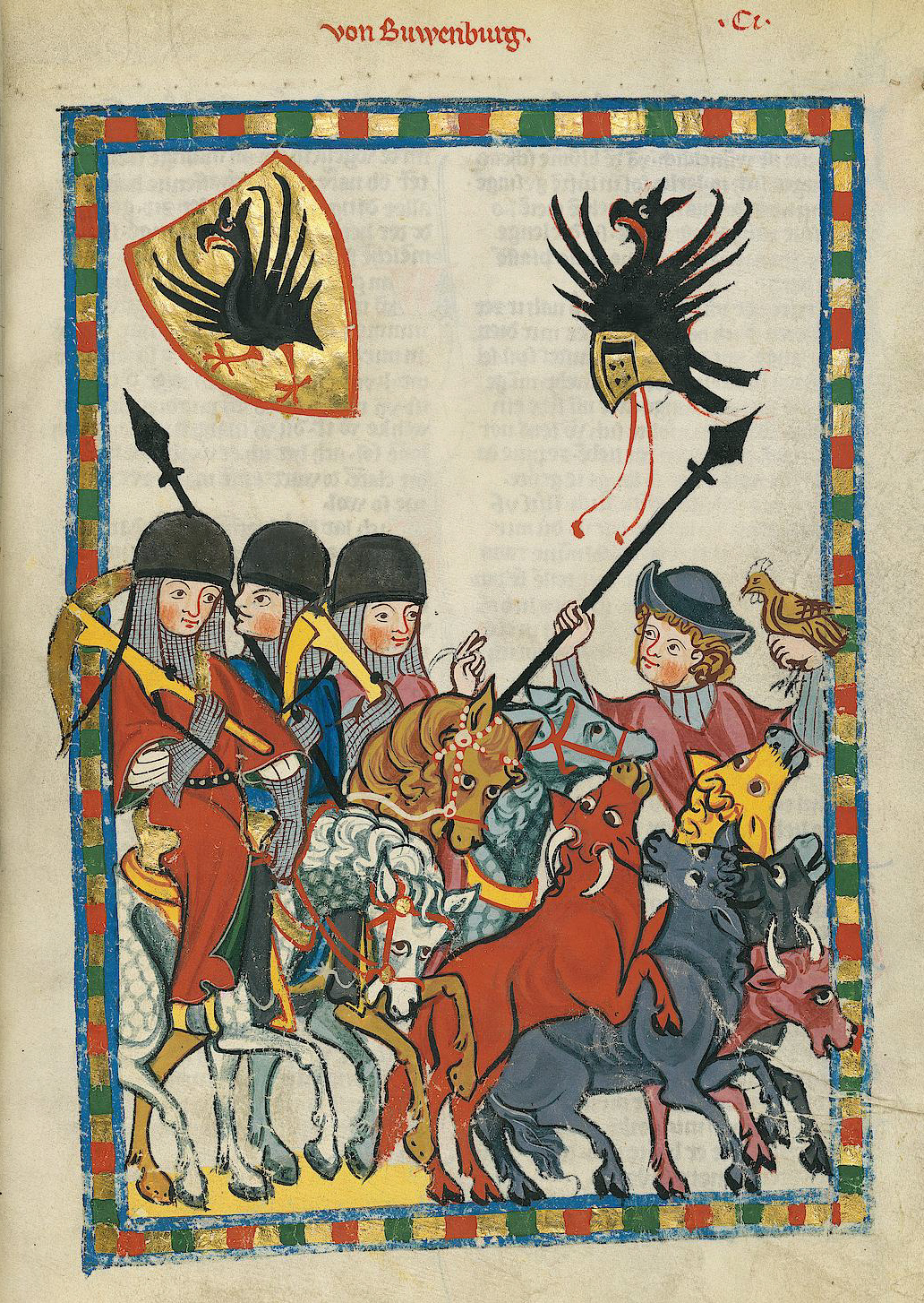 Codex Manesse, UB Heidelberg, Cod. Pal. germ. 848, fol. 359r: Von Buwenburg